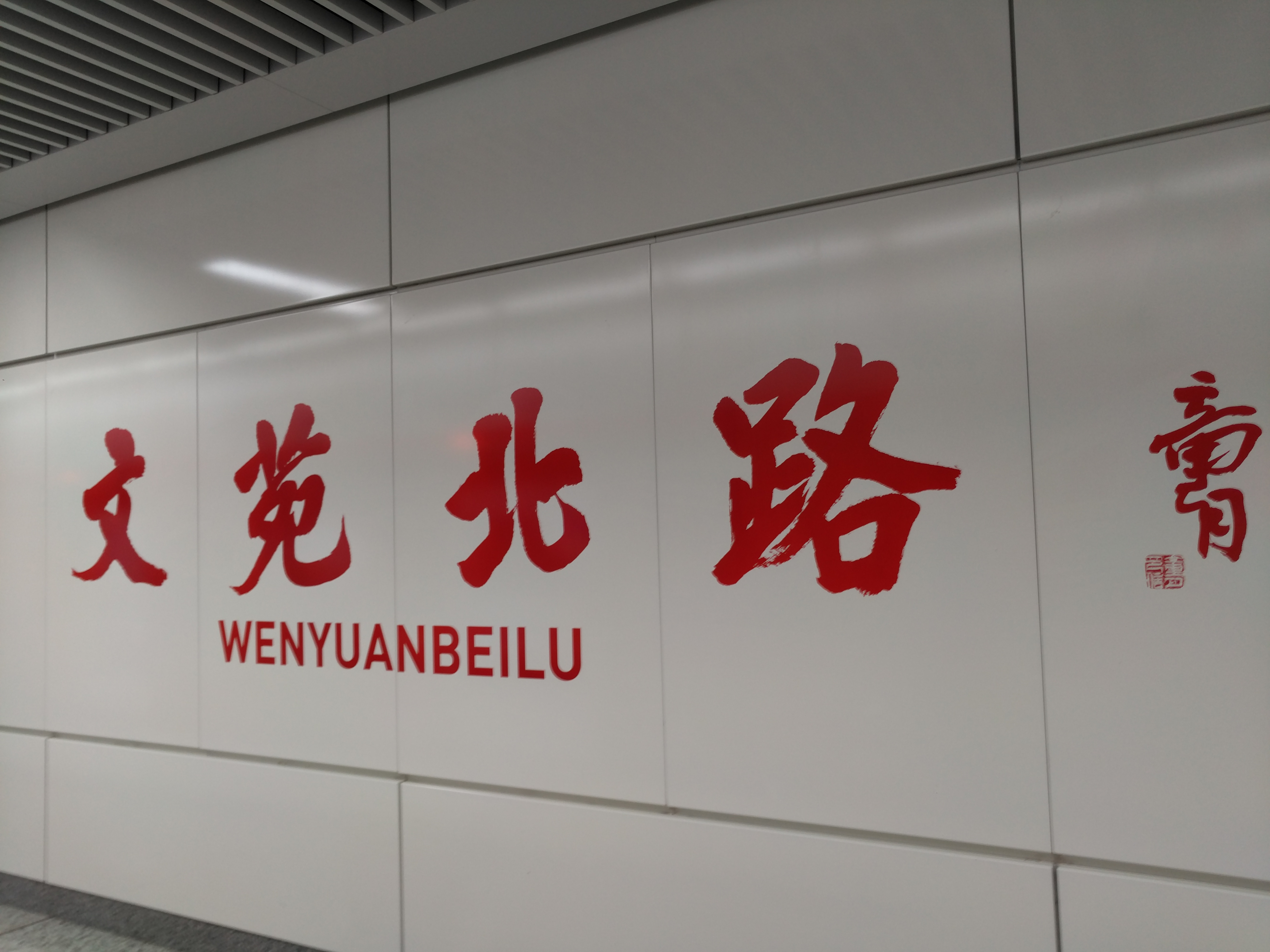 郑州地铁1号线二期文苑北路站